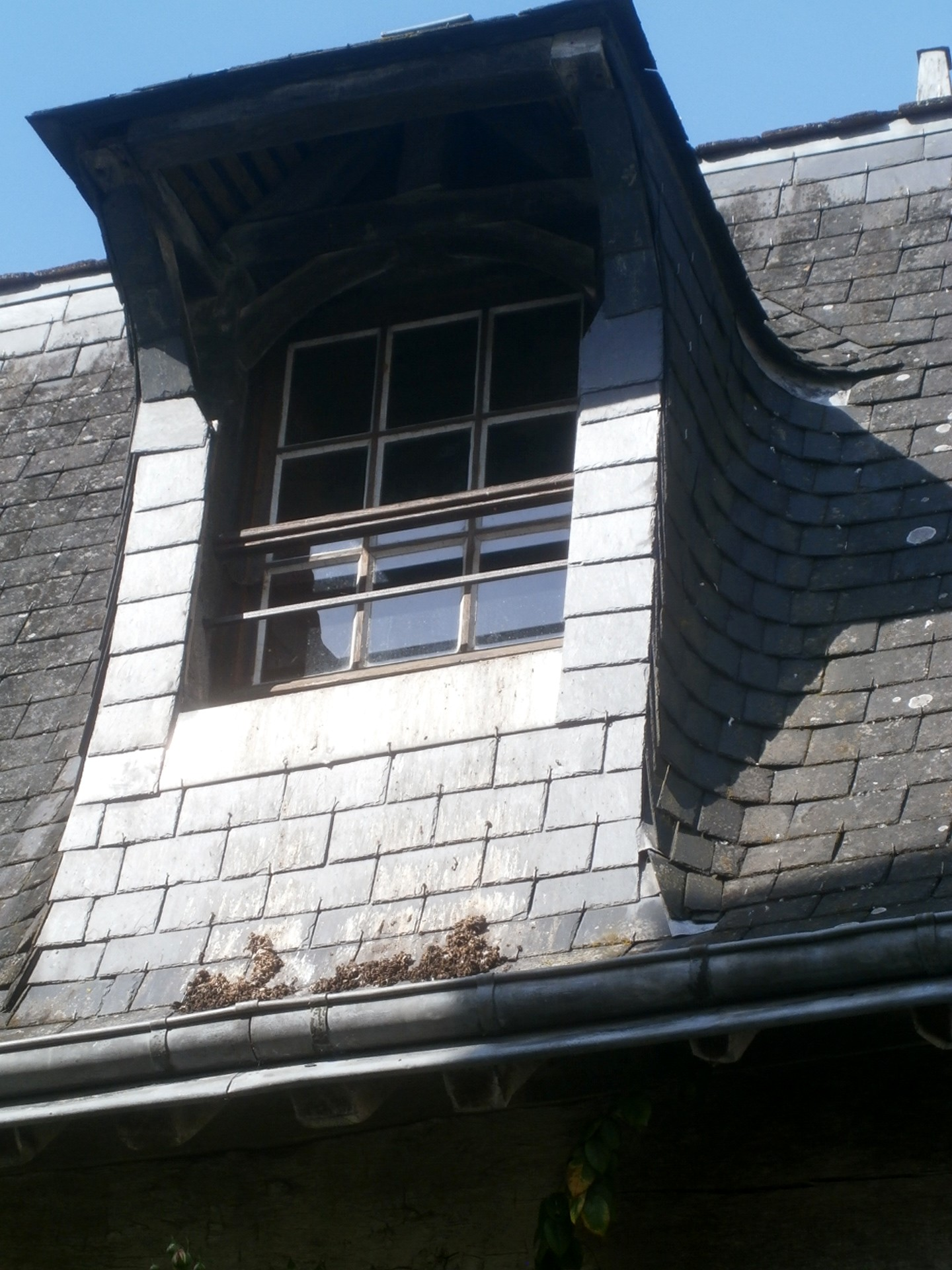 Lucarne mansardée de la halle aux laines